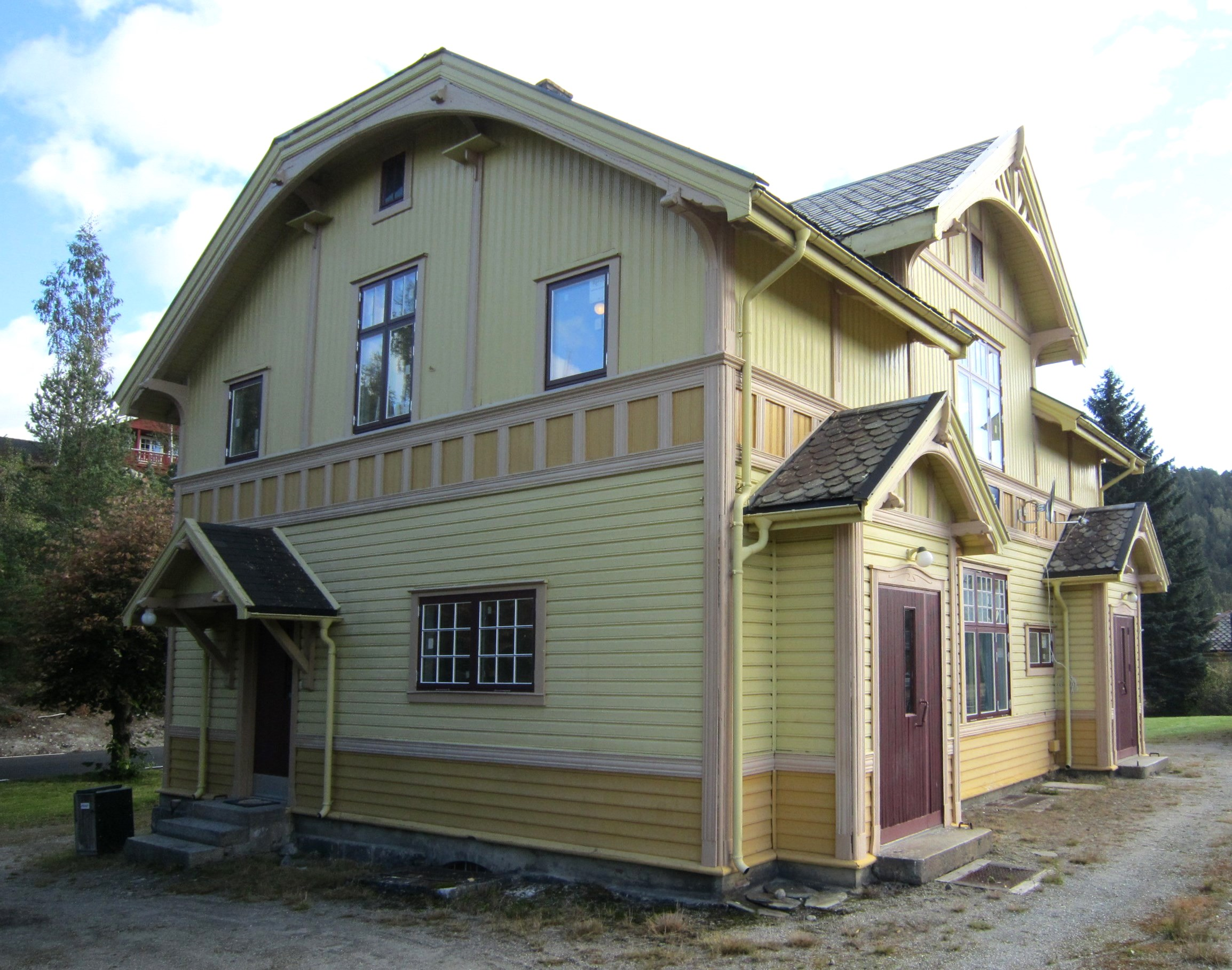 Gulsvik stasjon på Bergensbanen